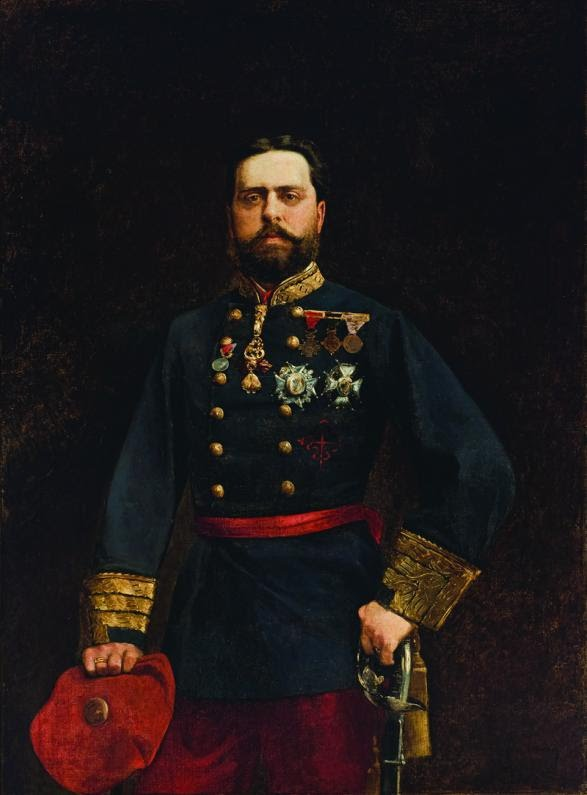 Retrato del pretendiente carlista Carlos María de Borbón y Austria-Este (1848-1909), que fue conocido como Carlos VII de España por sus partidarios.